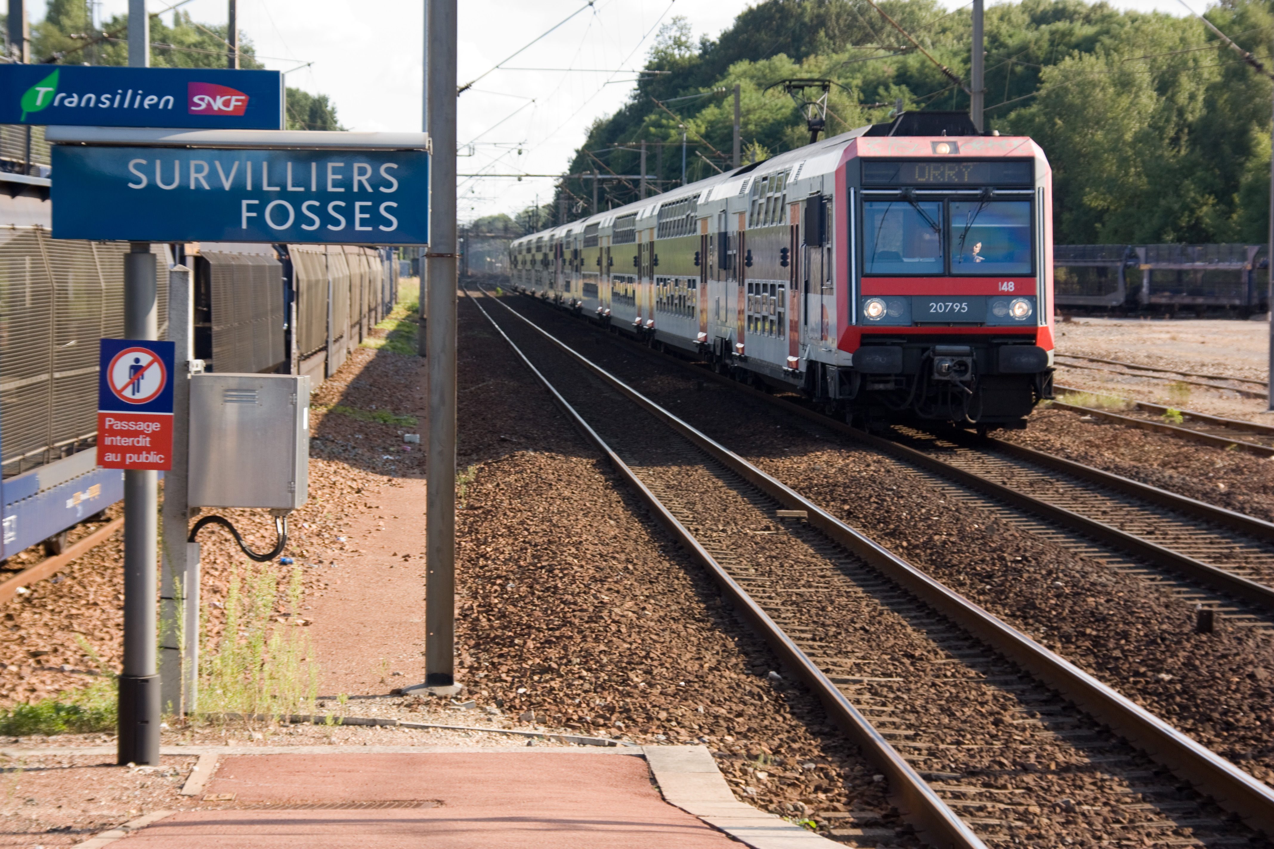 Gare de Survilliers - Fosses, département du Val-d'Oise, France